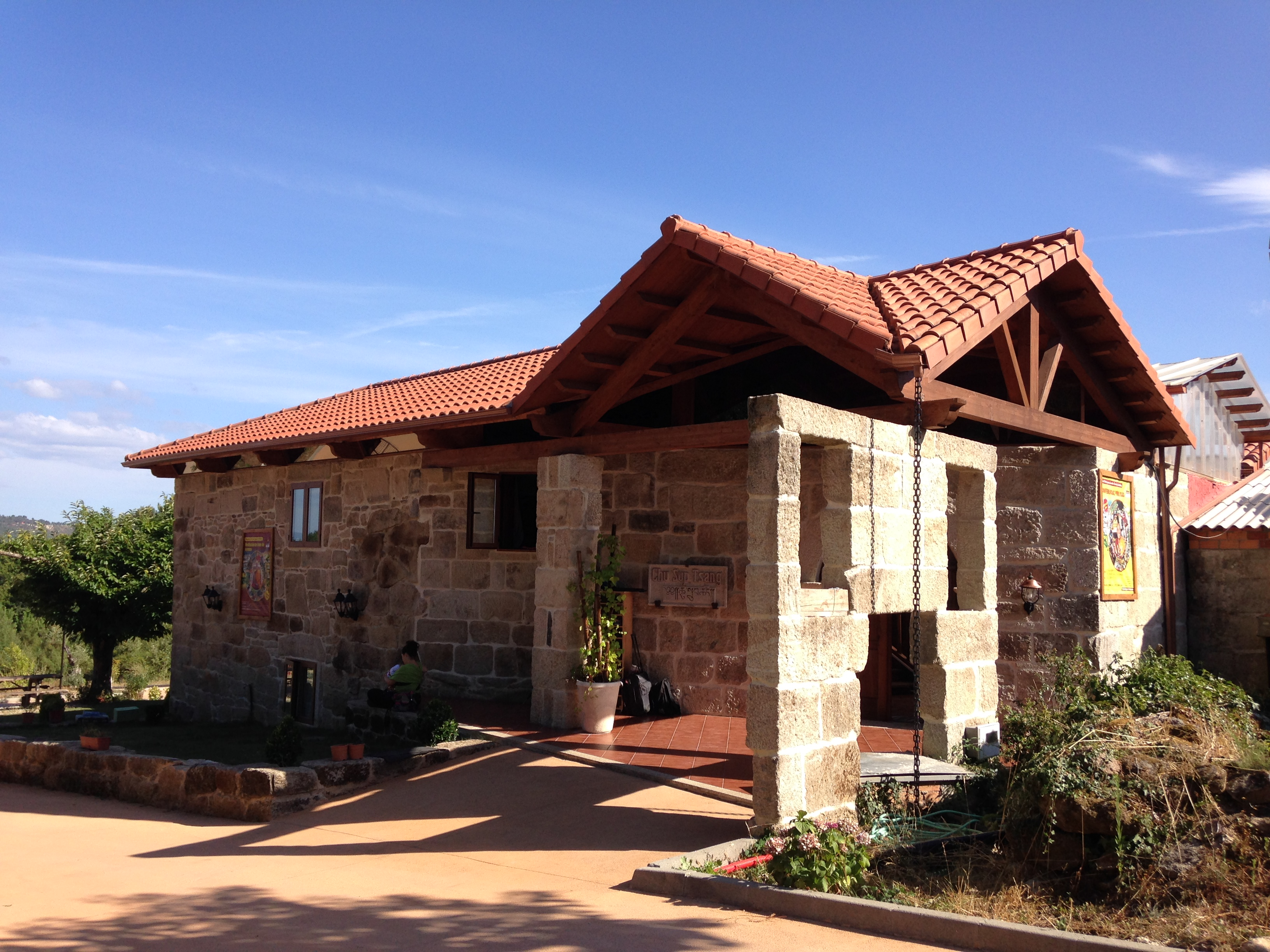 Fachada do Mosteiro Budista de Ventoselo (San Amaro, Ourense)